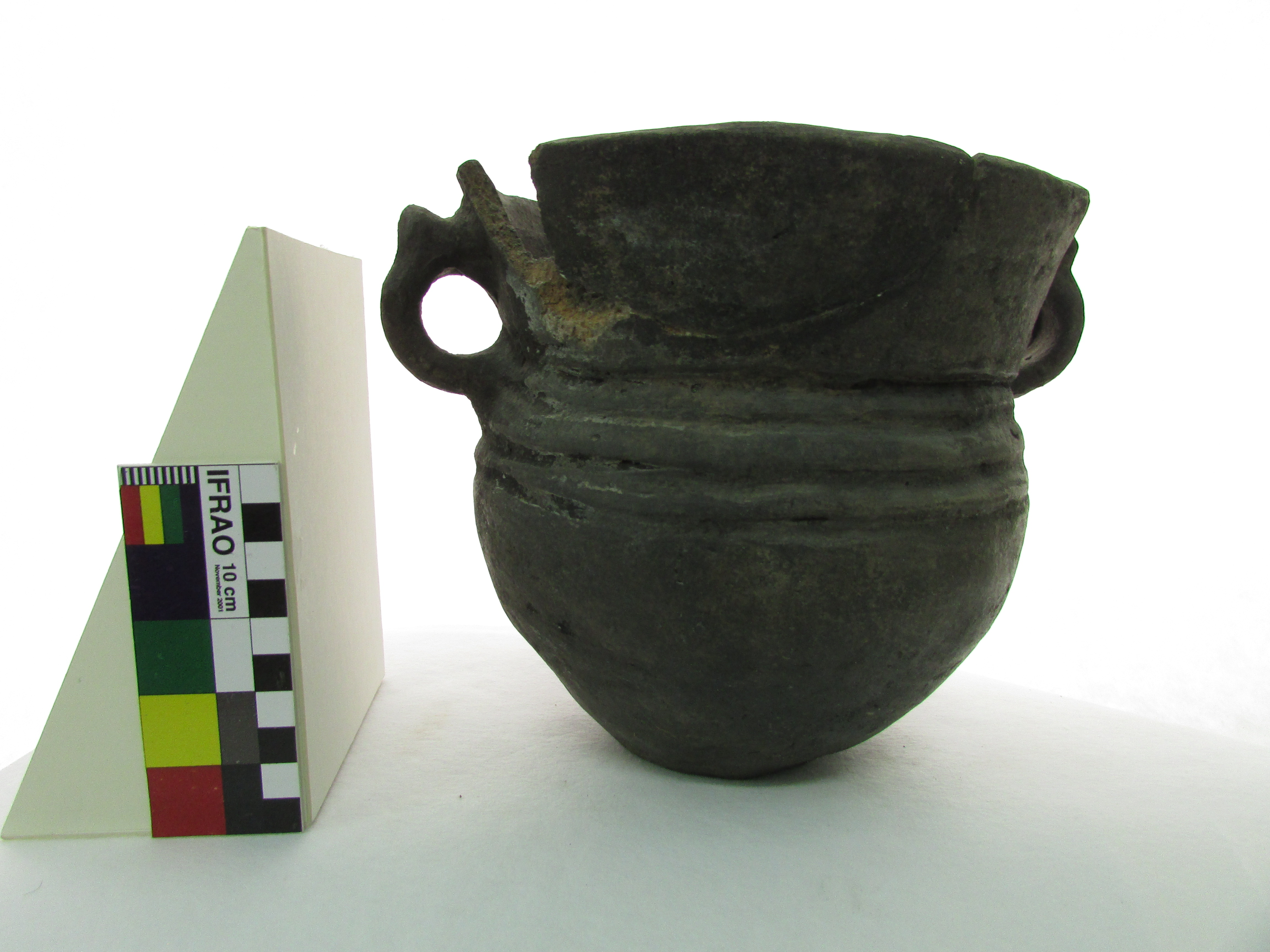 Pieza alojada en el Museo Estación Cultural Lucinda Larrosa, Fernández Oro, Río Negro, Patagonia argentina.